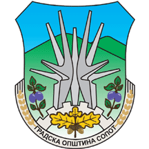 Грб општине Сопот